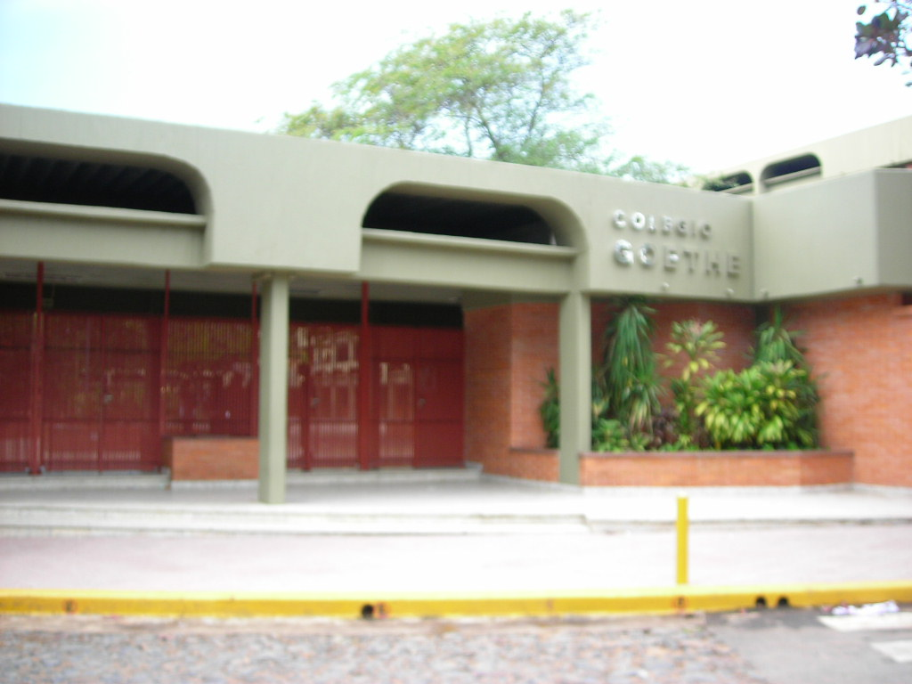 geet